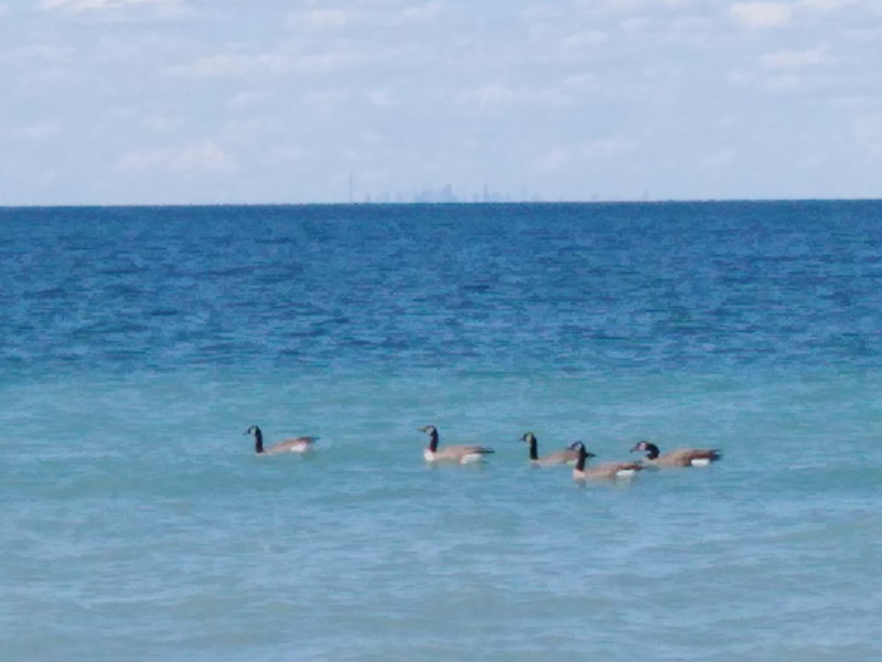 在尼亚加拉堡州立公园从安大略湖上远眺多伦多